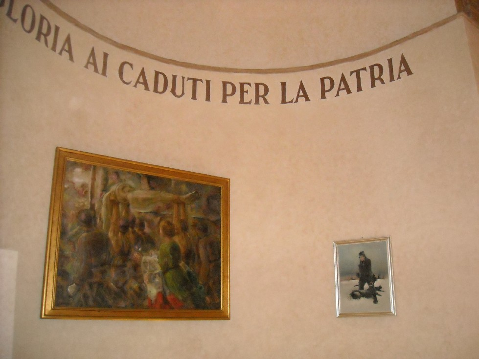 La parete dell'abside del Sacrario dei caduti di Forlì. A sinistra "L'apoteosi dell'eroe" di Piero Angelini, a destra "Il Bersagliere di Tychovskoy" di Enzo Pasqui